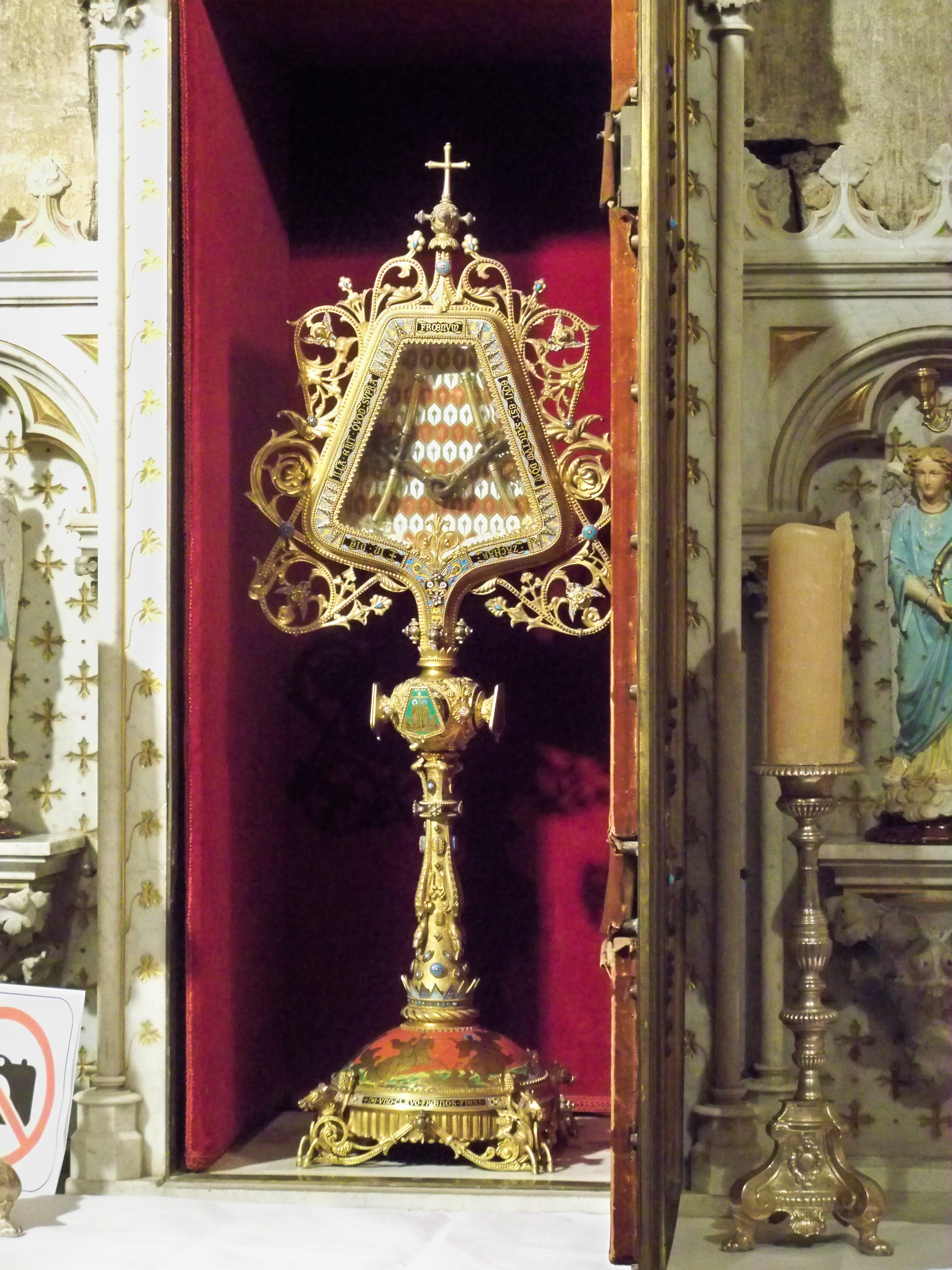 Relique le Saint Mors, emblème de la Ville de Carpentras (Vaucluse), conservé à la Cathédrale Saint Siffrein